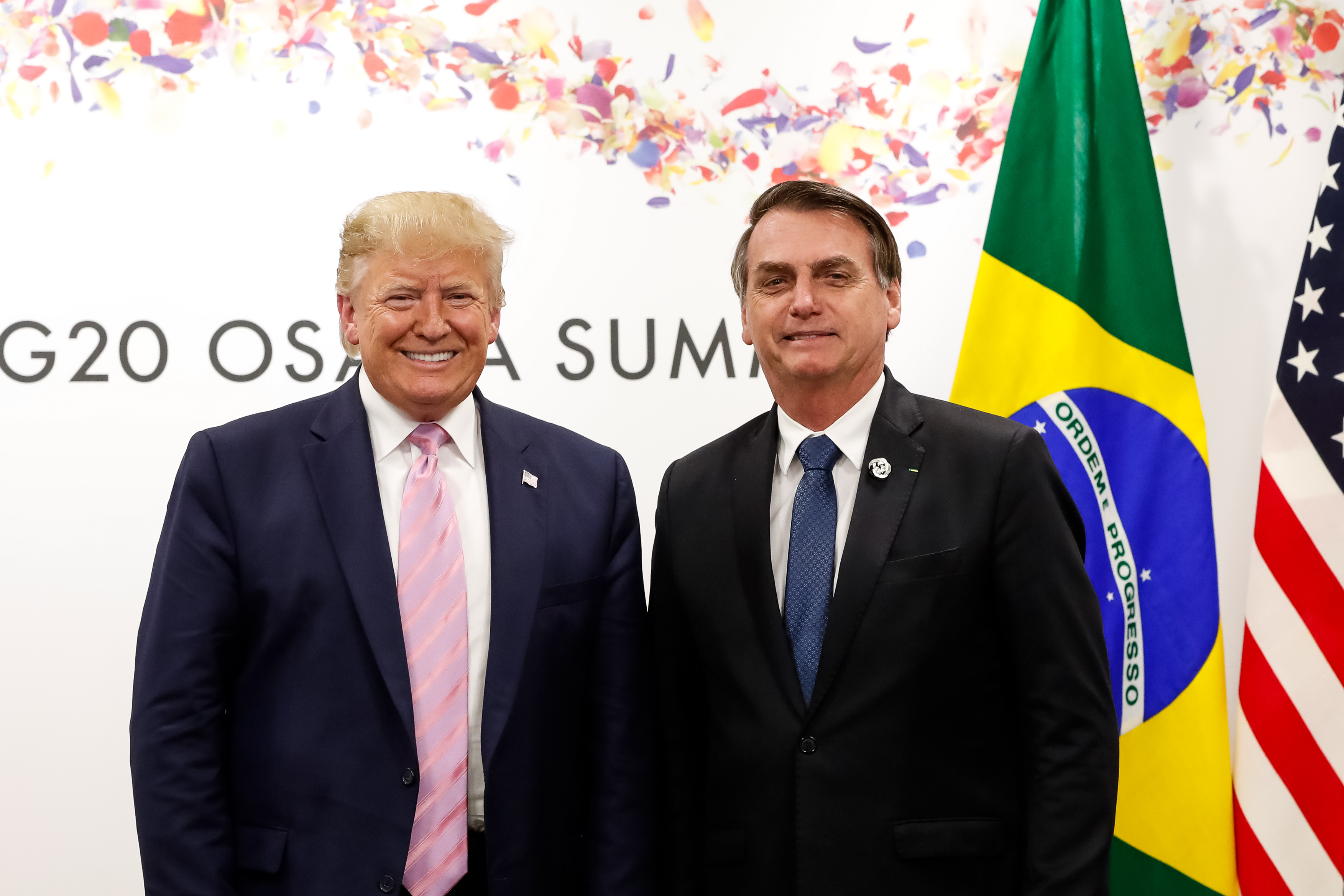 (Osaka - Japão, 28/06/2019) Presidente da República, Jair Bolsonaro, durante Reunião bilateral com o senhor Donald J. Trump, Presidente dos Estados Unidos da América. Foto: Alan Santos/PR